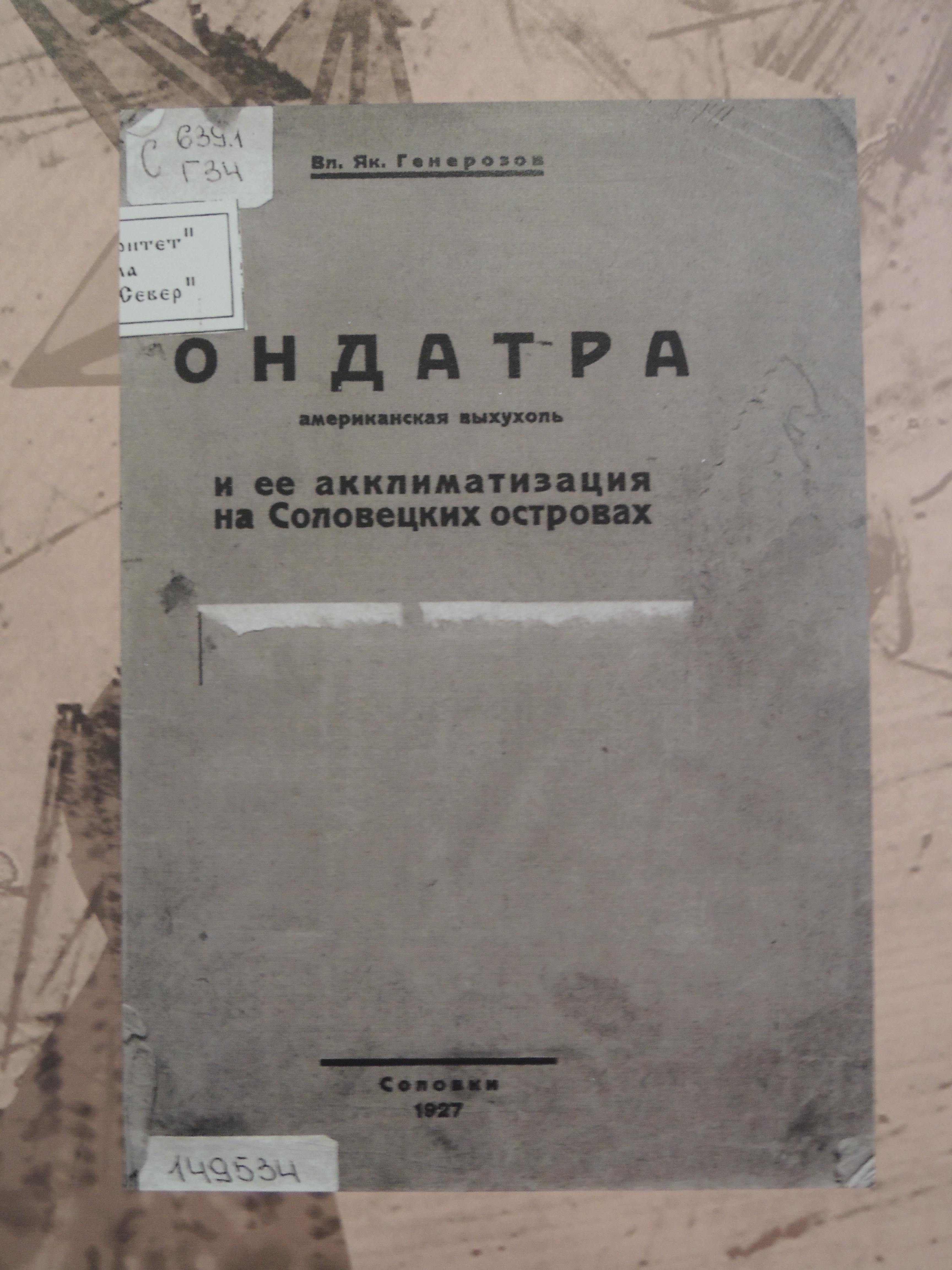 Выставка «Преодоление: Русская Церковь и Советская власть» в Государственном центральном музее современной истории России в Москве, 2012